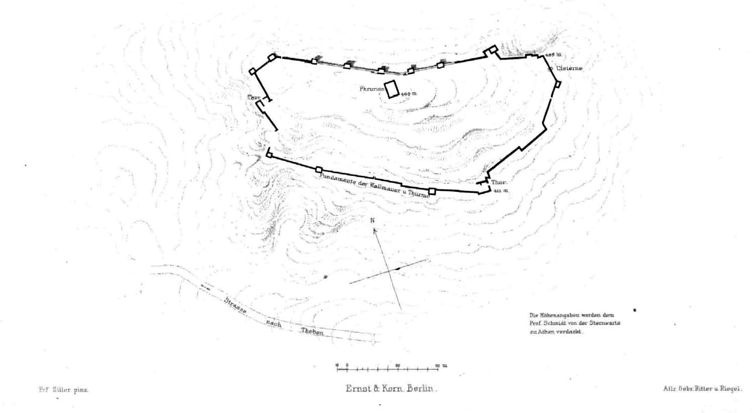 Grundriss der ehemaligen Festung von Eleutherai, Zeichnung von Ernst Ziller.